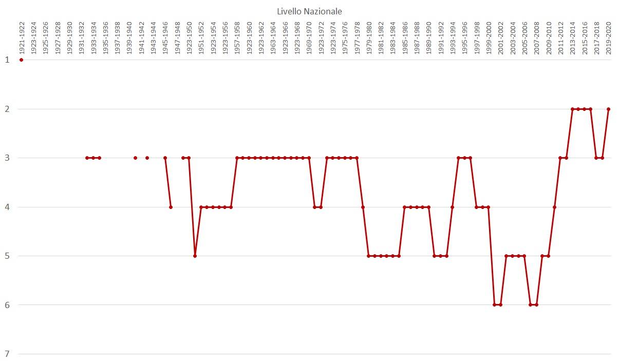 Grafico che mostra in maniera sintetica la partecipazione del Trapani Calcio ai campionati di livello nazionale